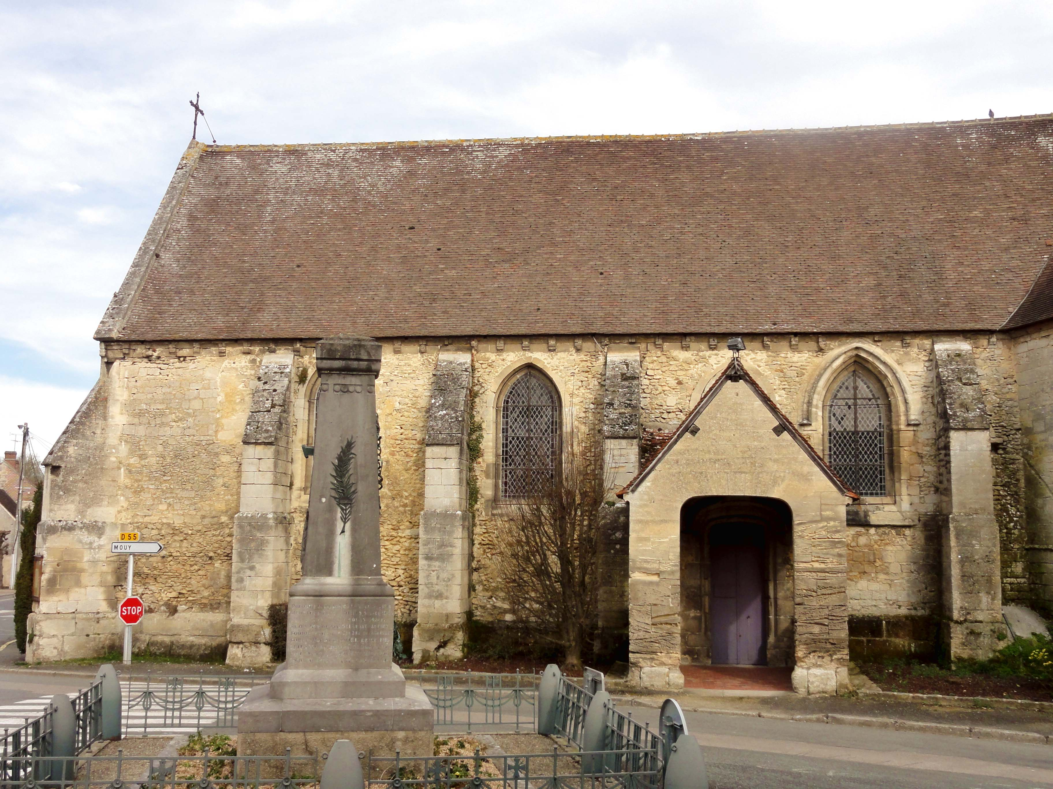 Voir titre.